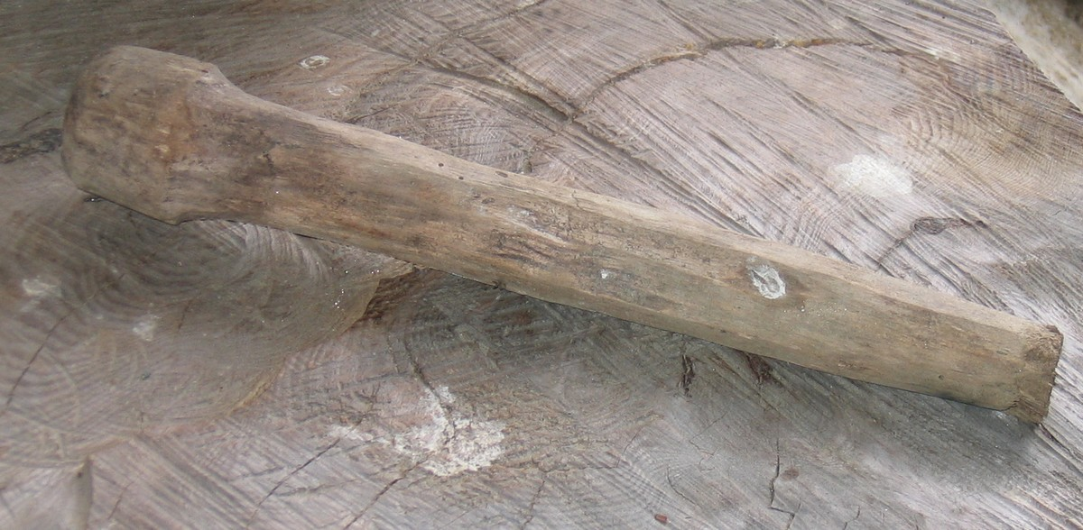 Trenagle brukt i grindløe